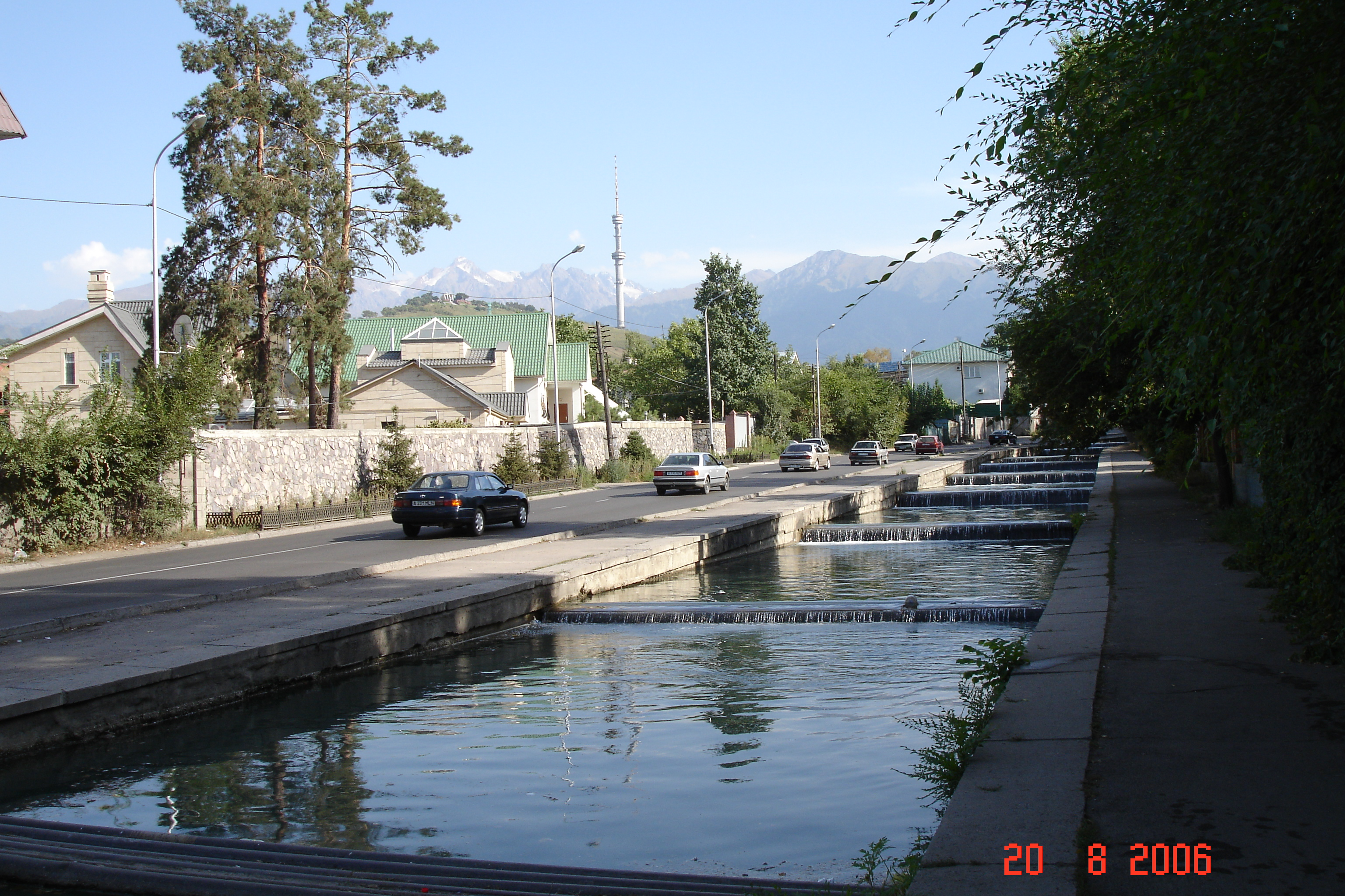 Малая Алматинка в черте города Алматы